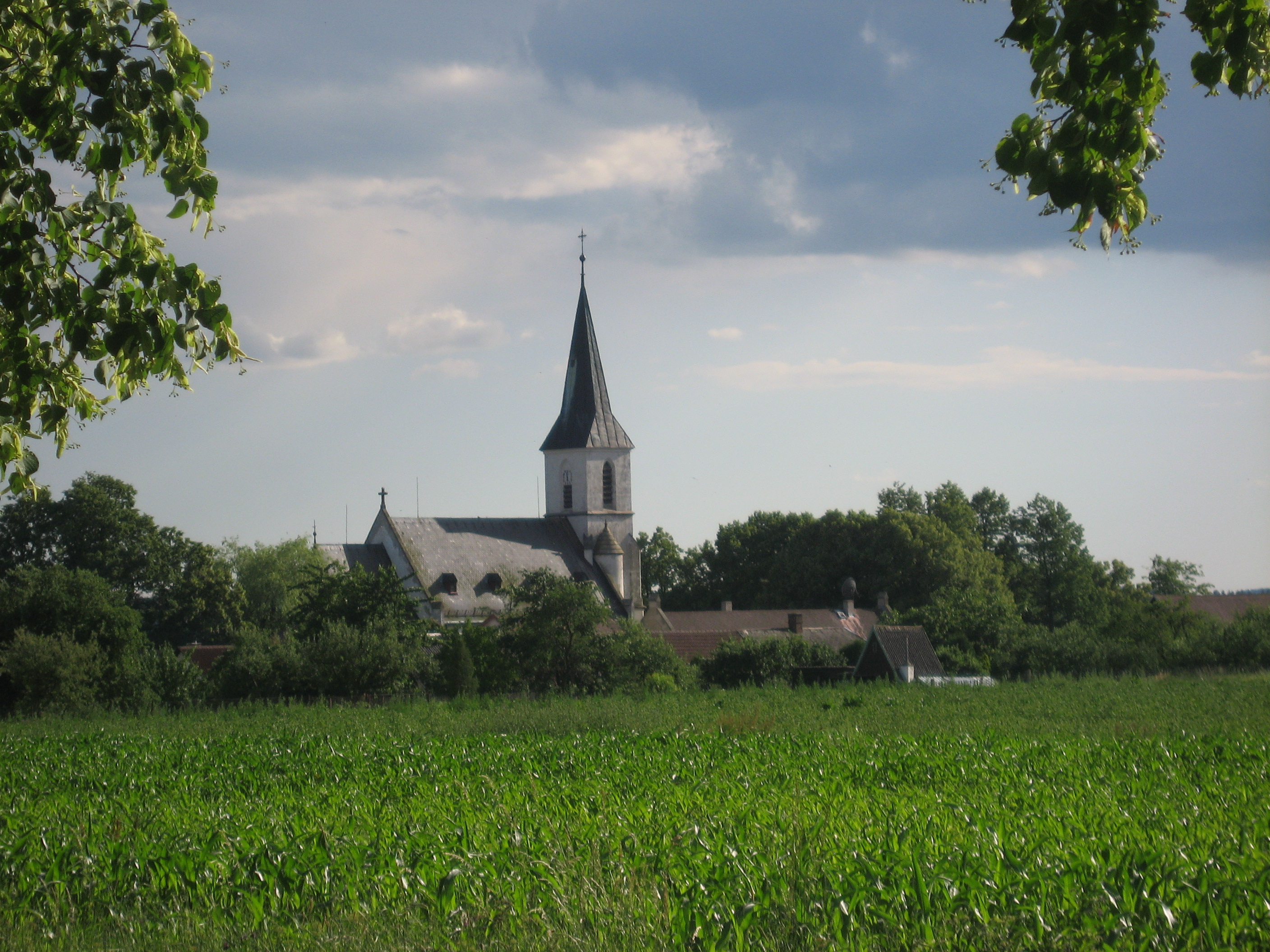 Ždírec, okres Jihlava - kostel sv. Václava